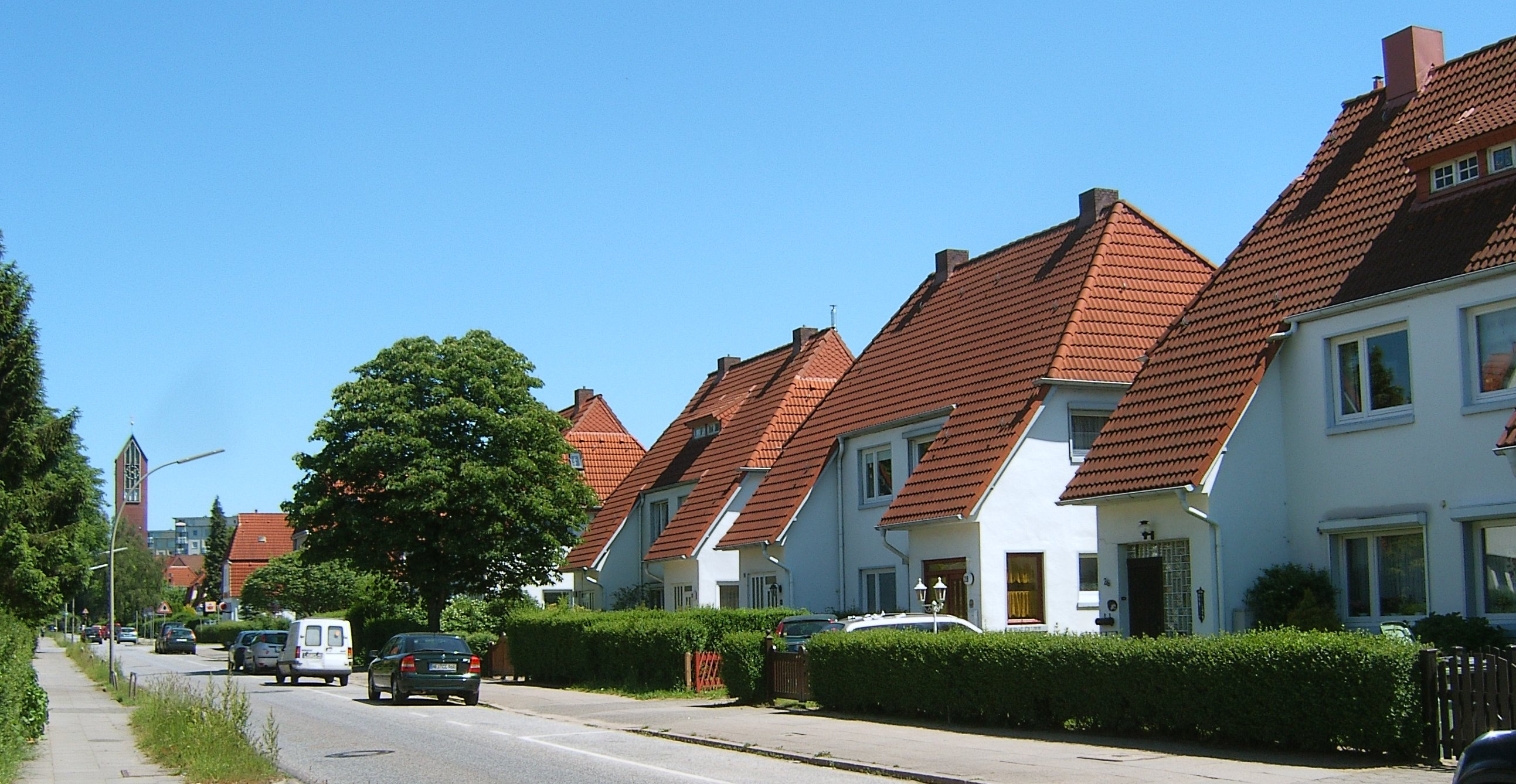 Hamburg, Wandsbek-Gartenstadt, Tilsiter Straße